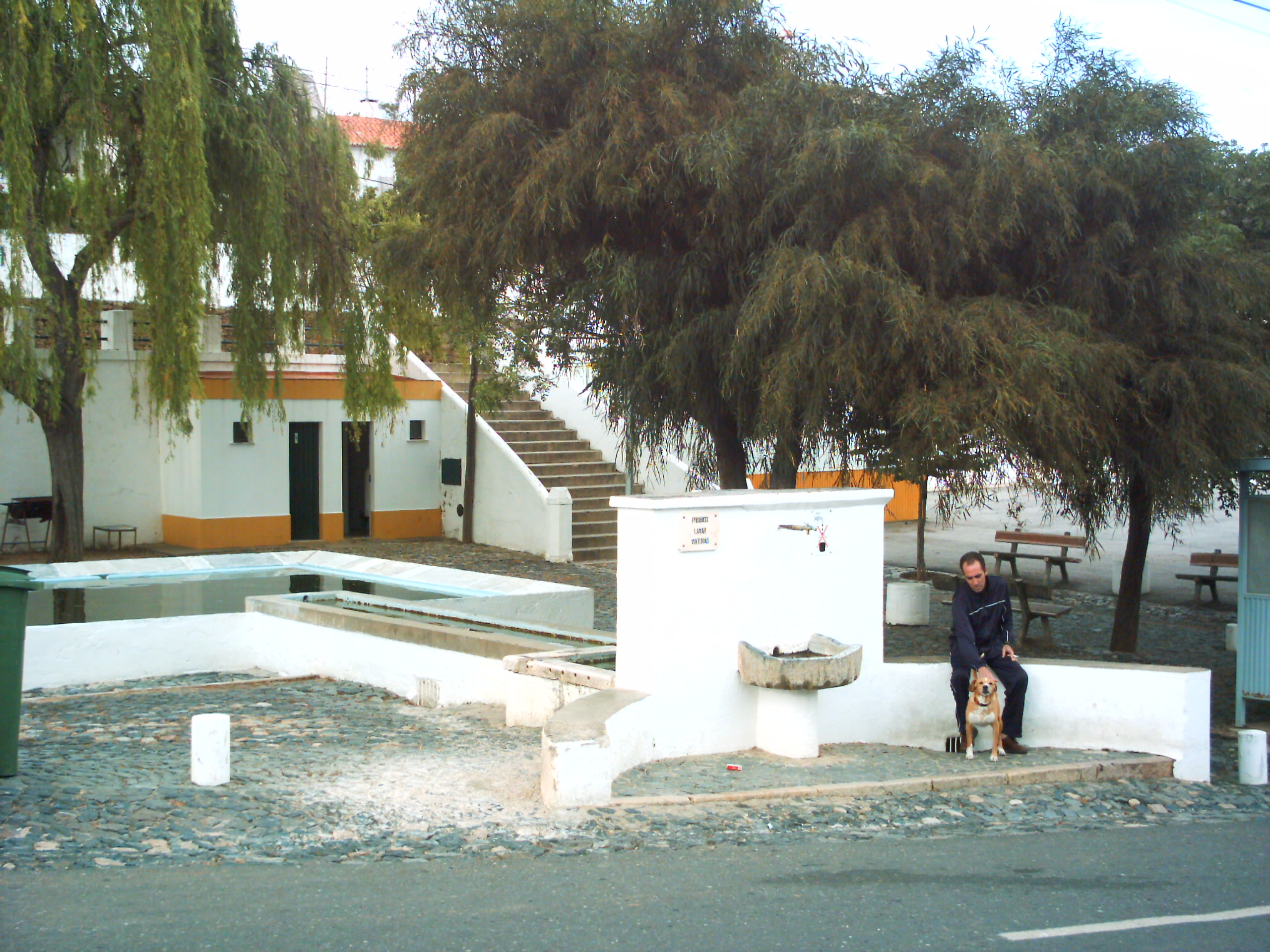 Largo da bica em Alcaria da Serra